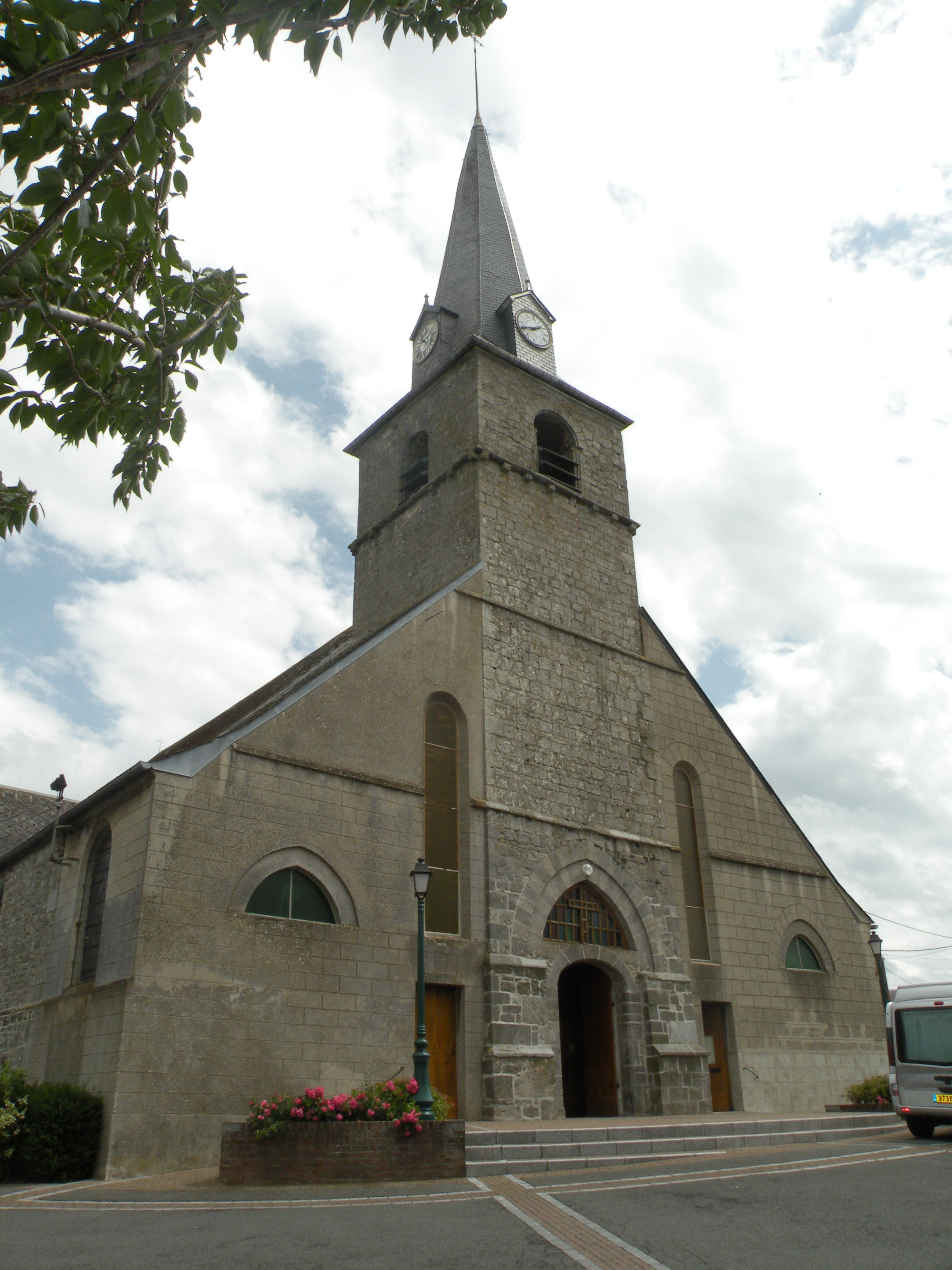 eglise d'Étrœungt